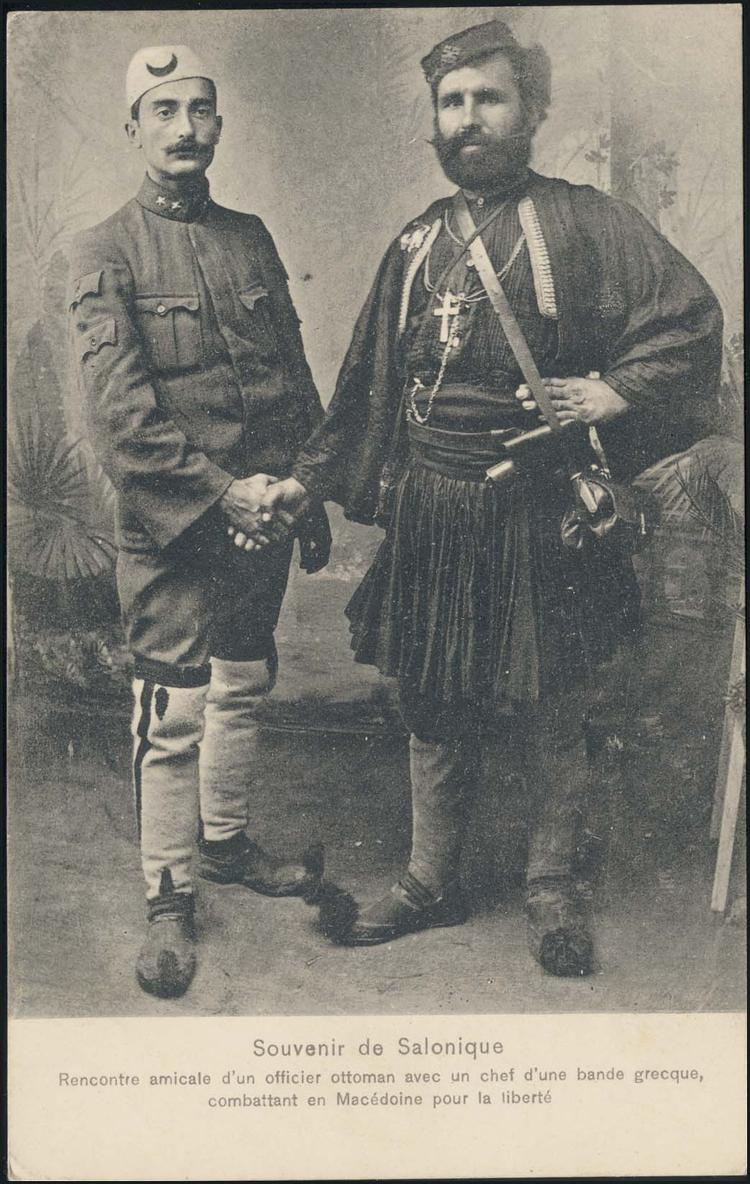 Апостолис Матопулос с младотурчина Халил бей след Хуриета.